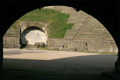 Avenches: Amphitheater